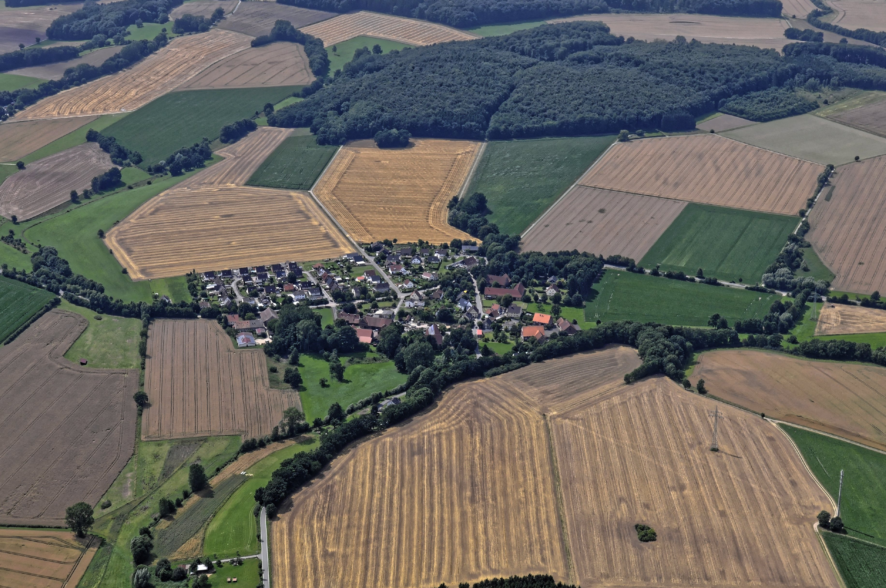 Bilder vom Flug Nordholz-Hammelburg 2015: Höntrup